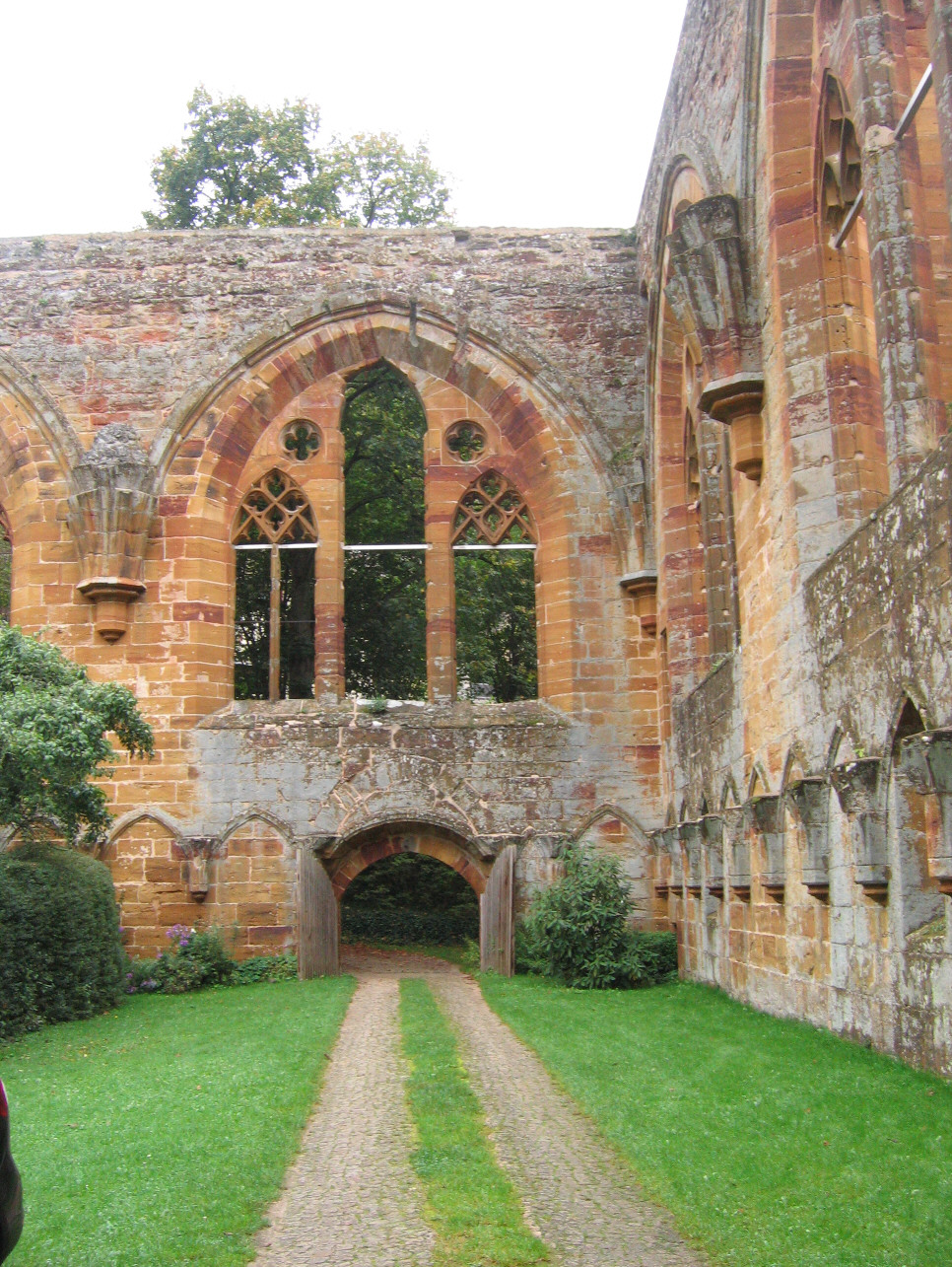 Kirche des Brigittenklosters Gnadenberg